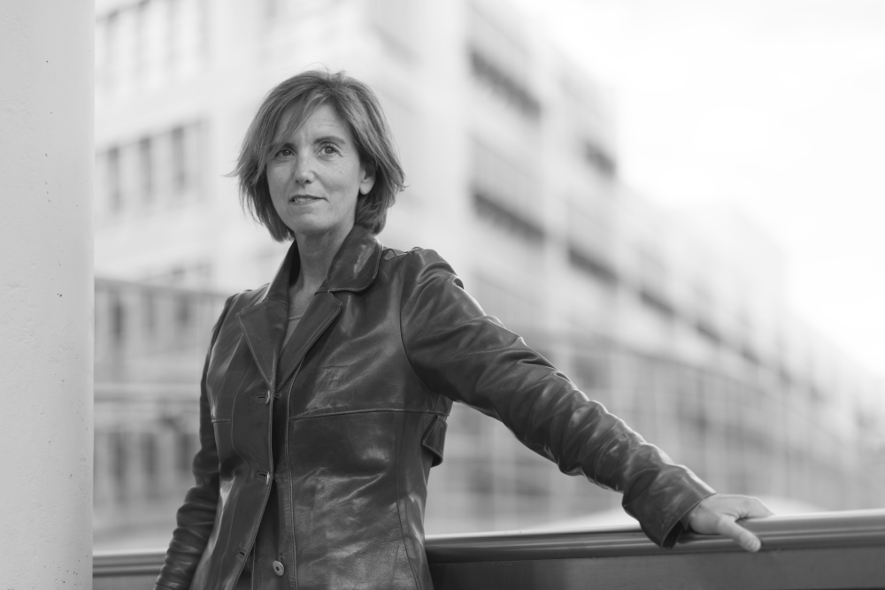 Portrait der Filmregisseurin Sibylle Tafel